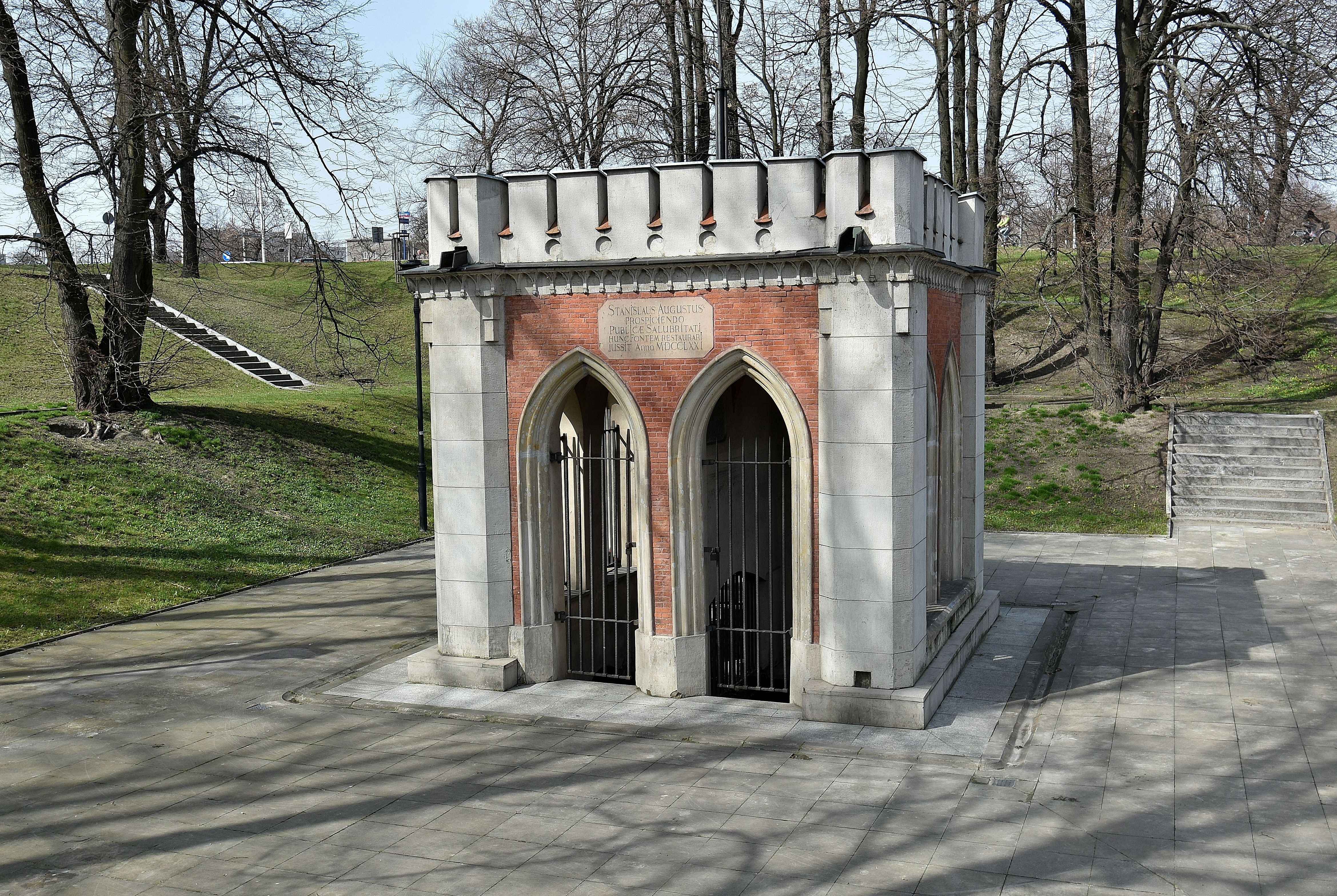 Zdrój Stanisława Augusta w Warszawie